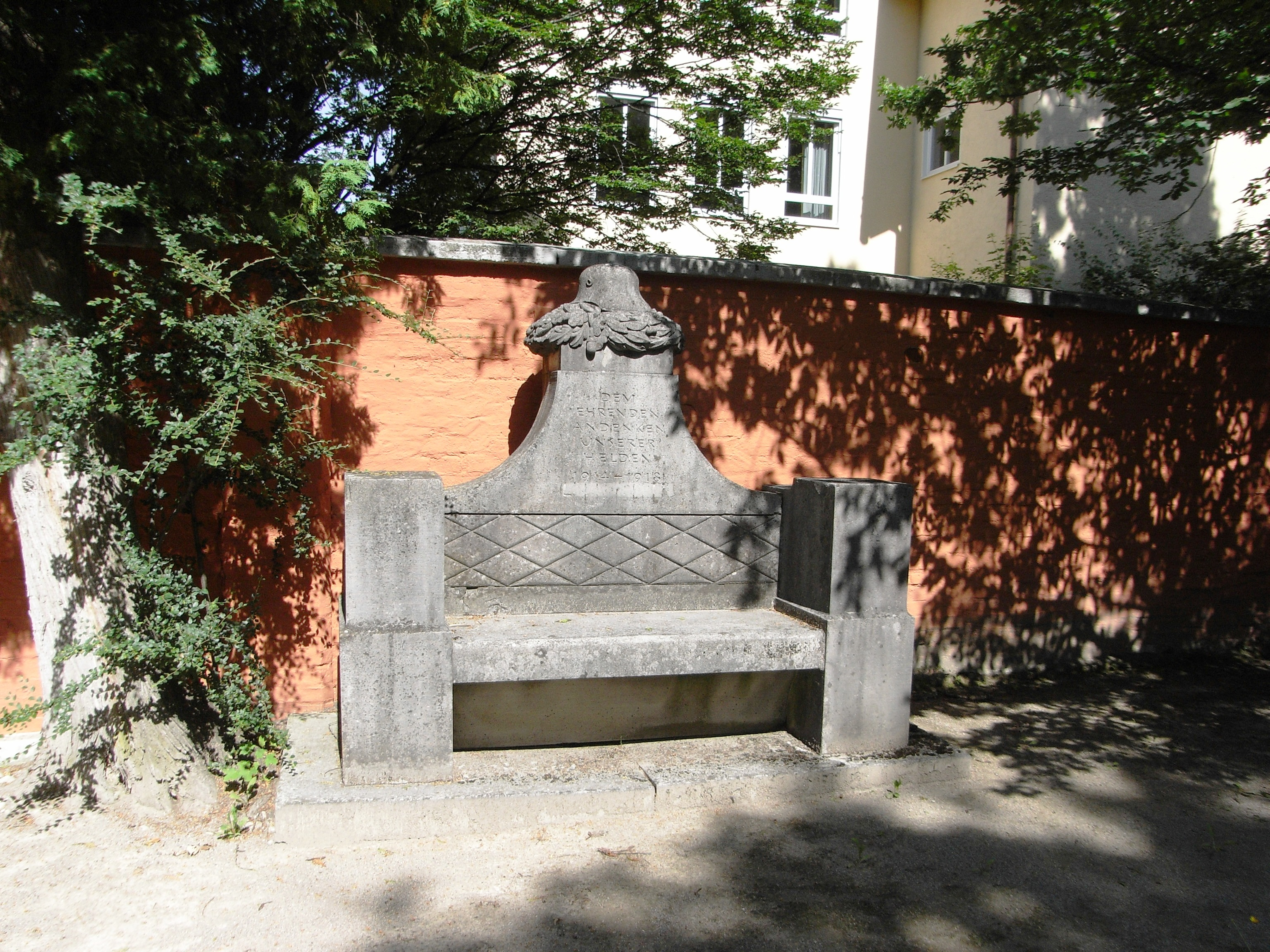 Judenfriedhof in Memmingen, Kriegerdenkmal zu Ehren der im Ersten Weltkrieg Gefallenen